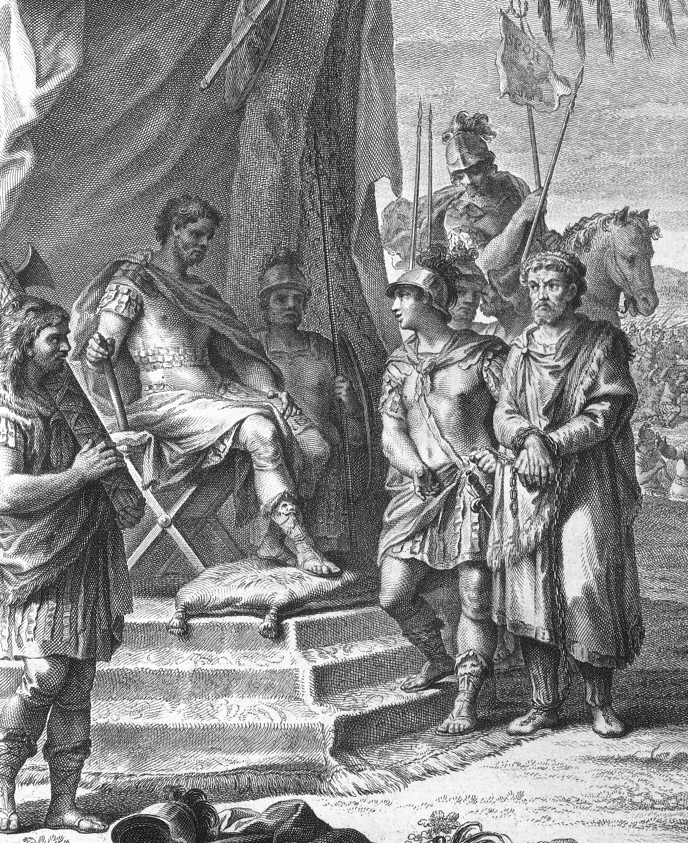 Jugurtha's capture. Drawing from : [D.n Gabriel de Borbon, Infante de España], La conjuracion de Catilina y la Guerra de Jugurta por Cayo Salustio Crispo, Madrid, Joachin Ibarra, impresor de Camara del Rei Nuestro Señor, M.DCC.LXXII. The picture is in front of page 97